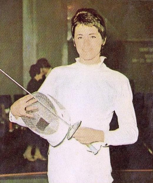 Marie-Chantal Depetris-Demaille en 1972 (JO, épéiste), 'Munchen 72', Panini figurina n°39.